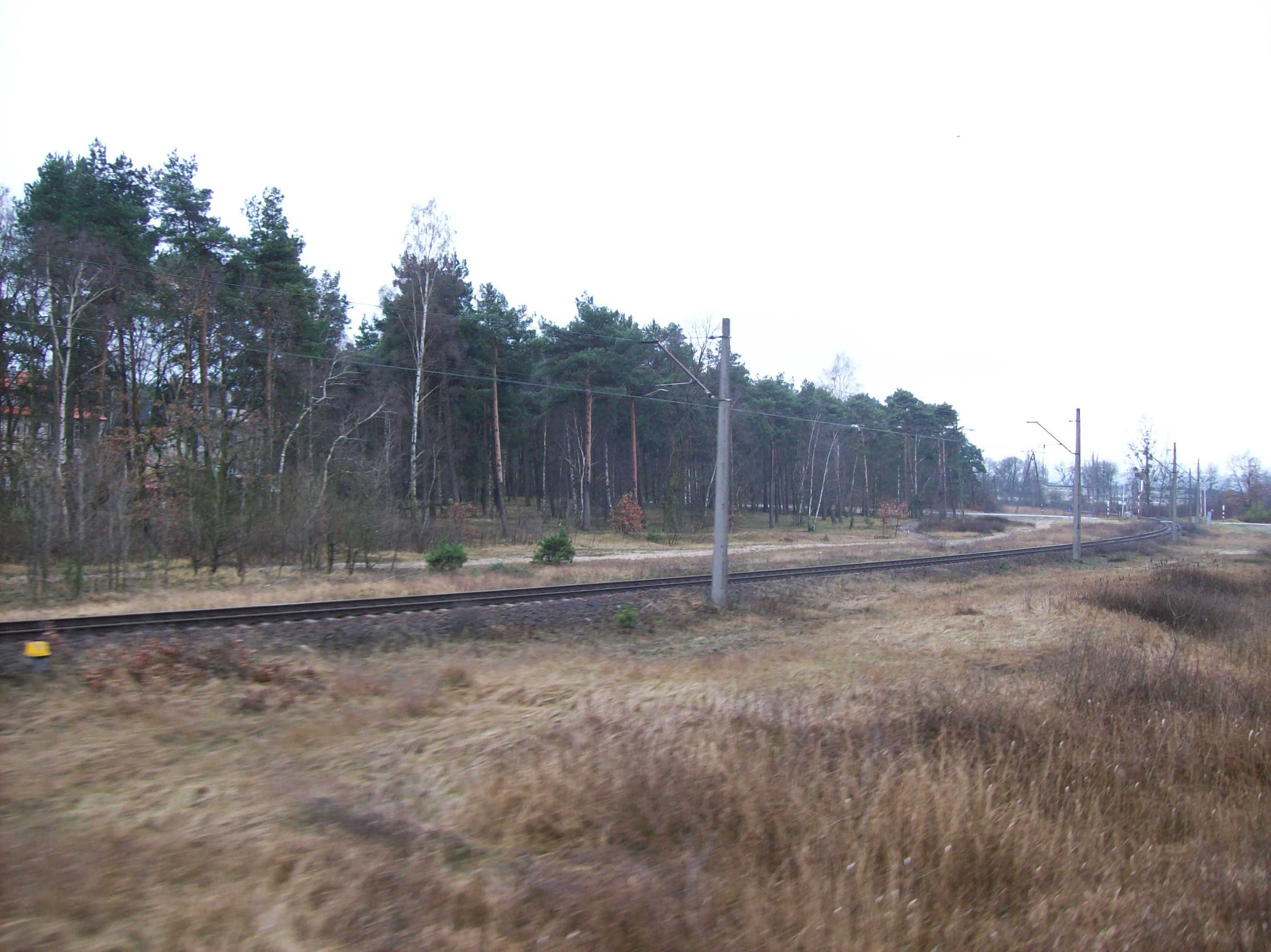 Linia kolejowa nr 401-tor nr 857